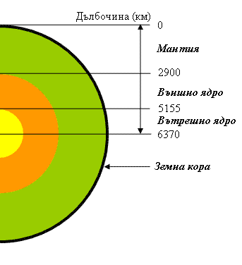 Вътрешният строеж на Земята